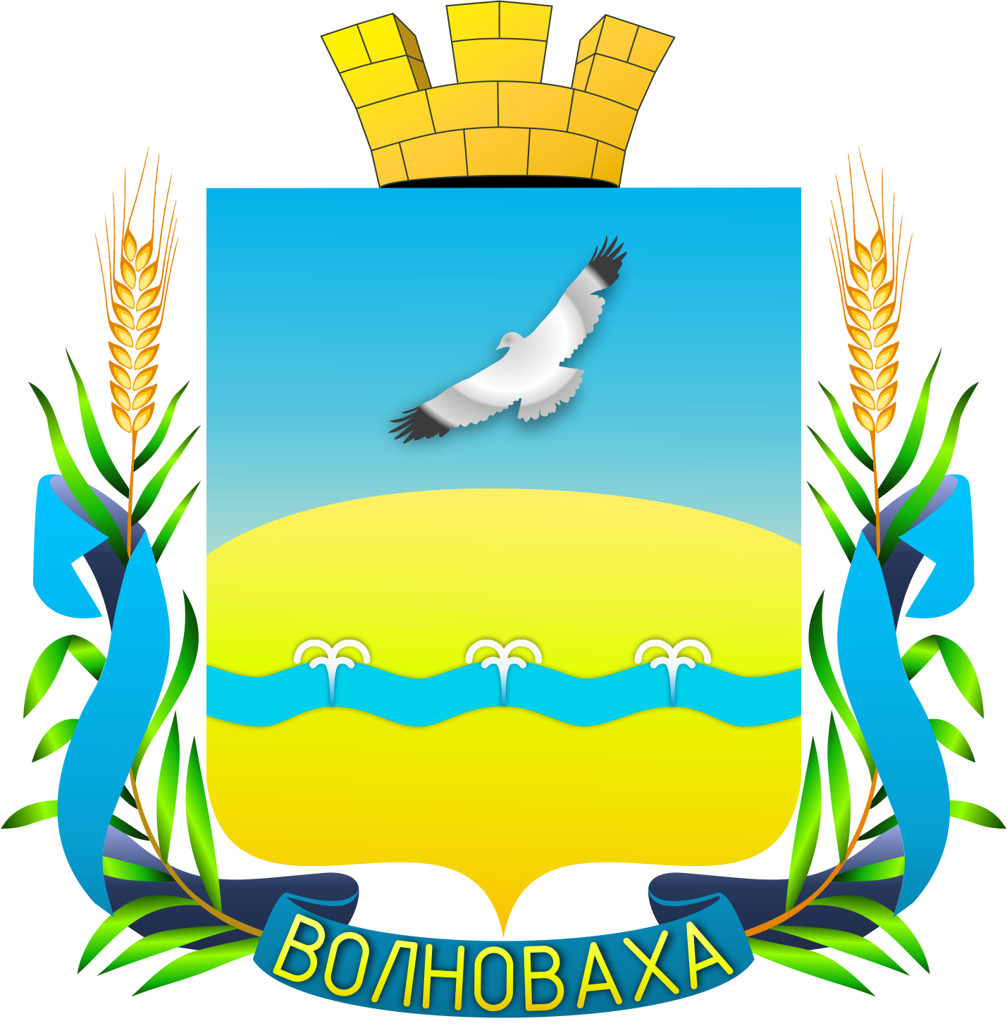 Герб города Волновахи